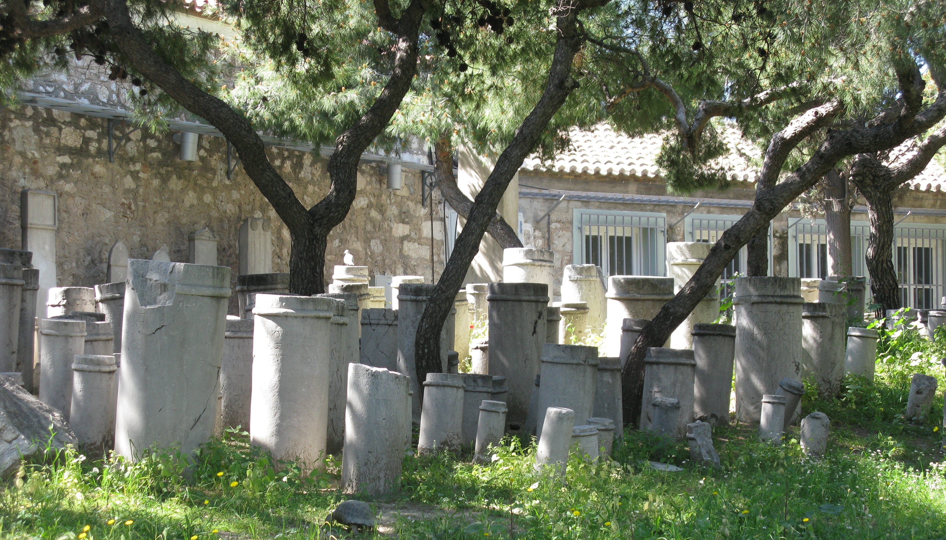 Κεραμεικός, Αρχαίο νεκροταφείο, Αθήνα.